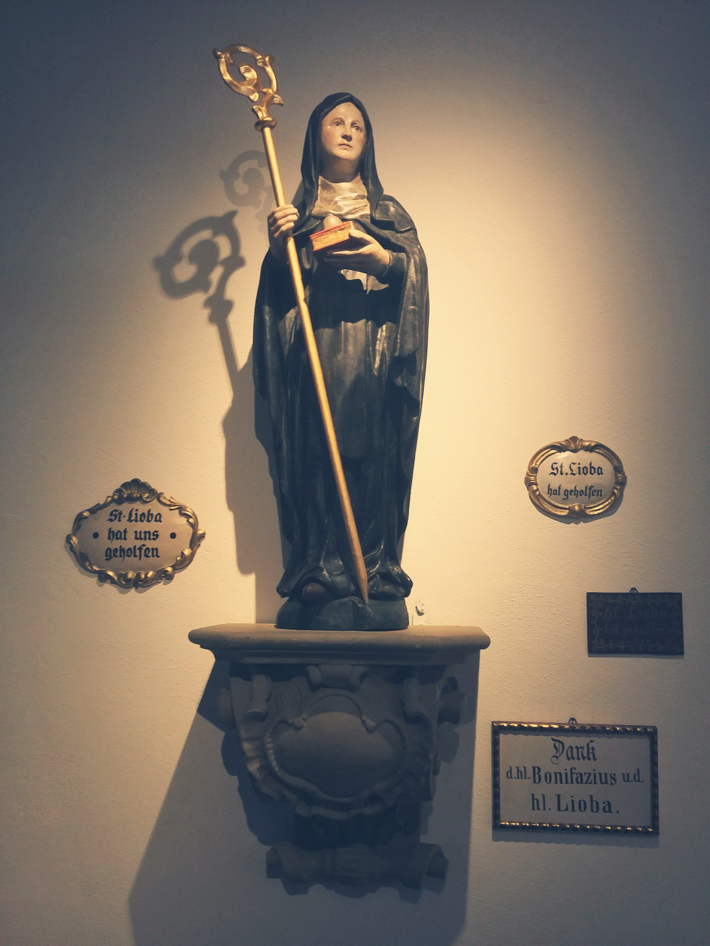 Andenken der heiligen Lioba